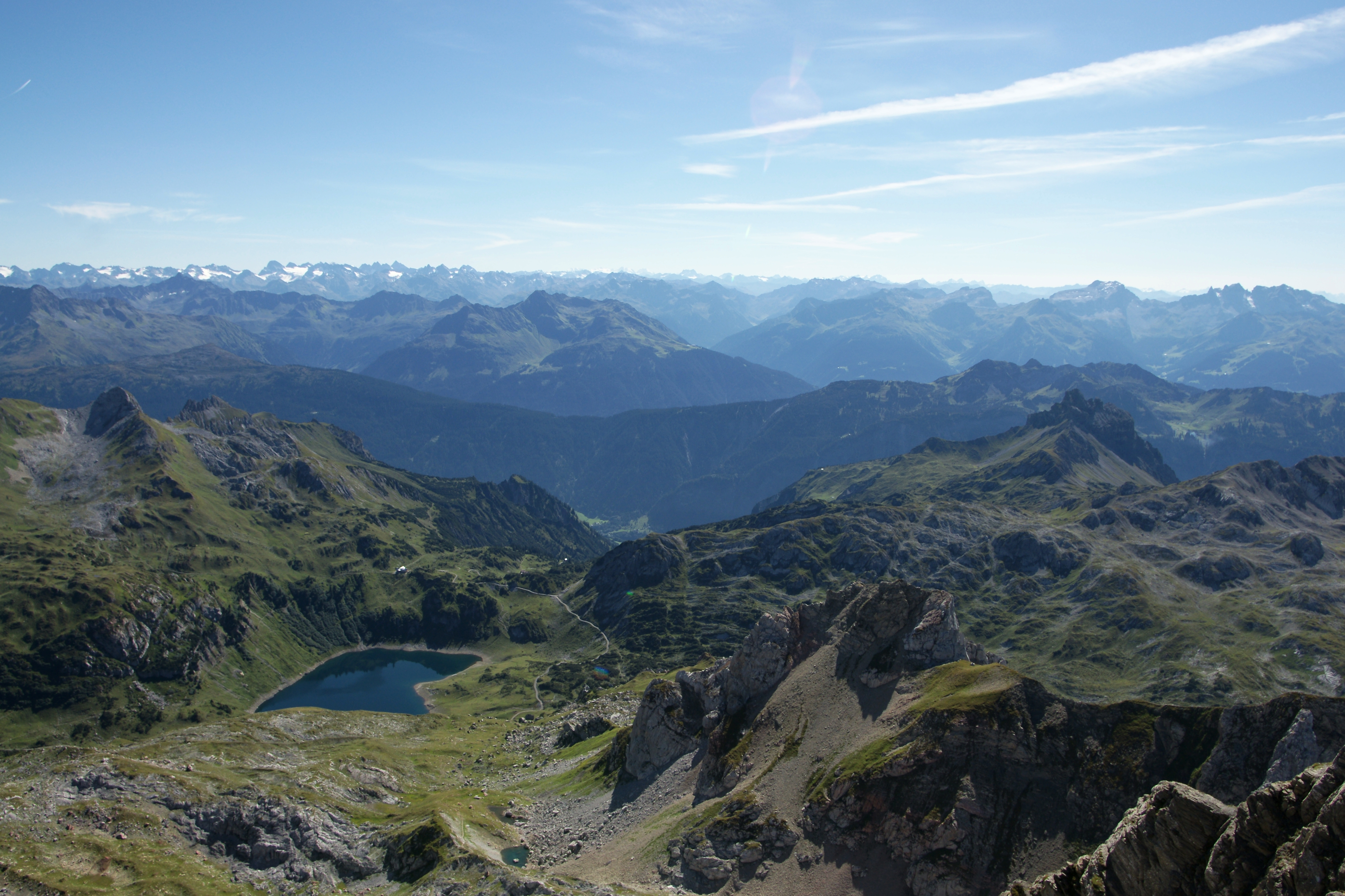 Blick vom Gipfel der Roten Wand 2.704m auf den Formarinsee im Lechquellengebirge. In der Bildmitte das Schrunser Hochjoch und rechts die Silvretta.